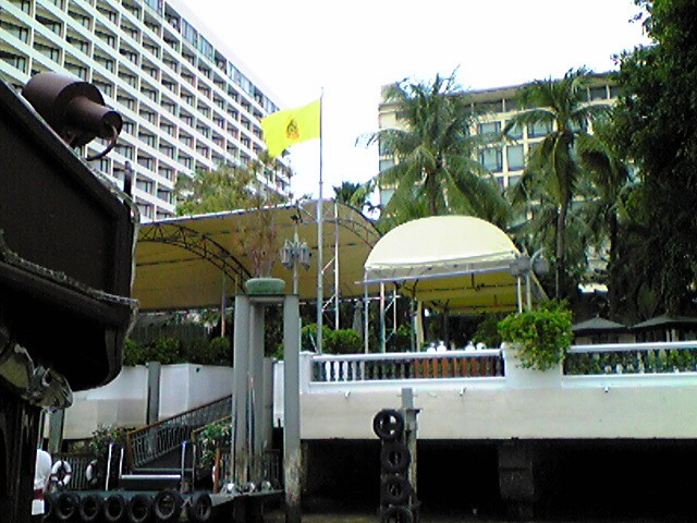 Oriental Hotel Pier